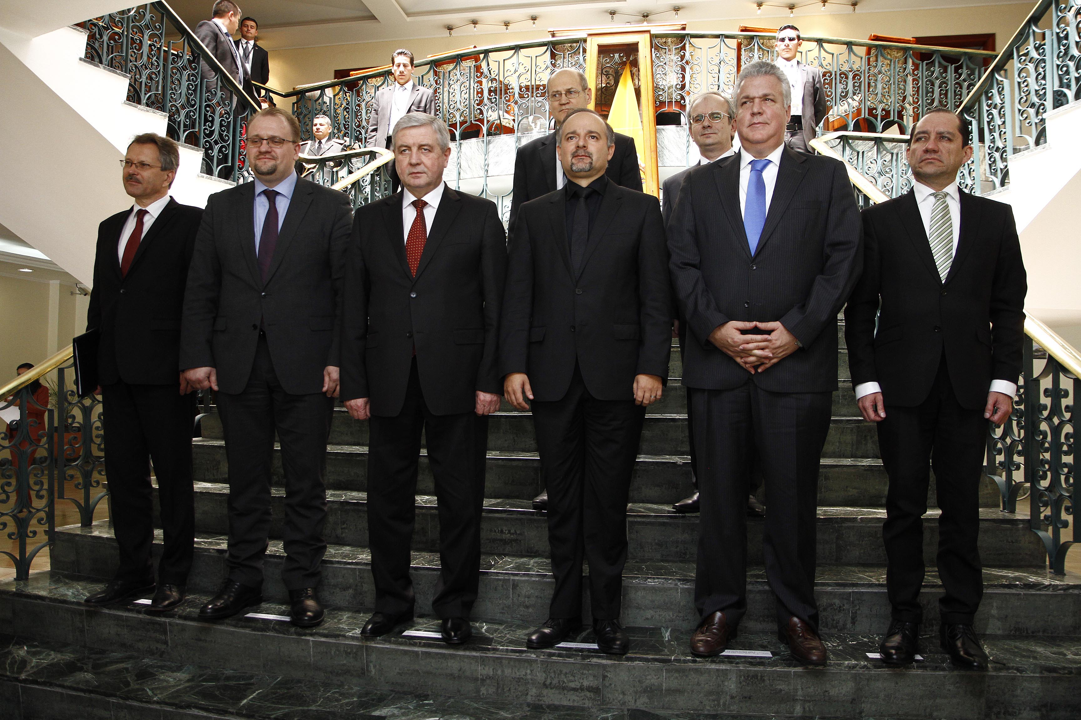 Quito, 12 feb (ANDES).- En los salones de la Cancillería se reunieron ell Viceprimer Ministro de Belarús Vladimir Semashko (c.) y Richard Espinoza Ministro Coordinador de Producción, Empleo y Competitividad quienes firmaron una serie de acuerdo en beneficio de los dos países. Foto: Micaela Ayala V./ANDES